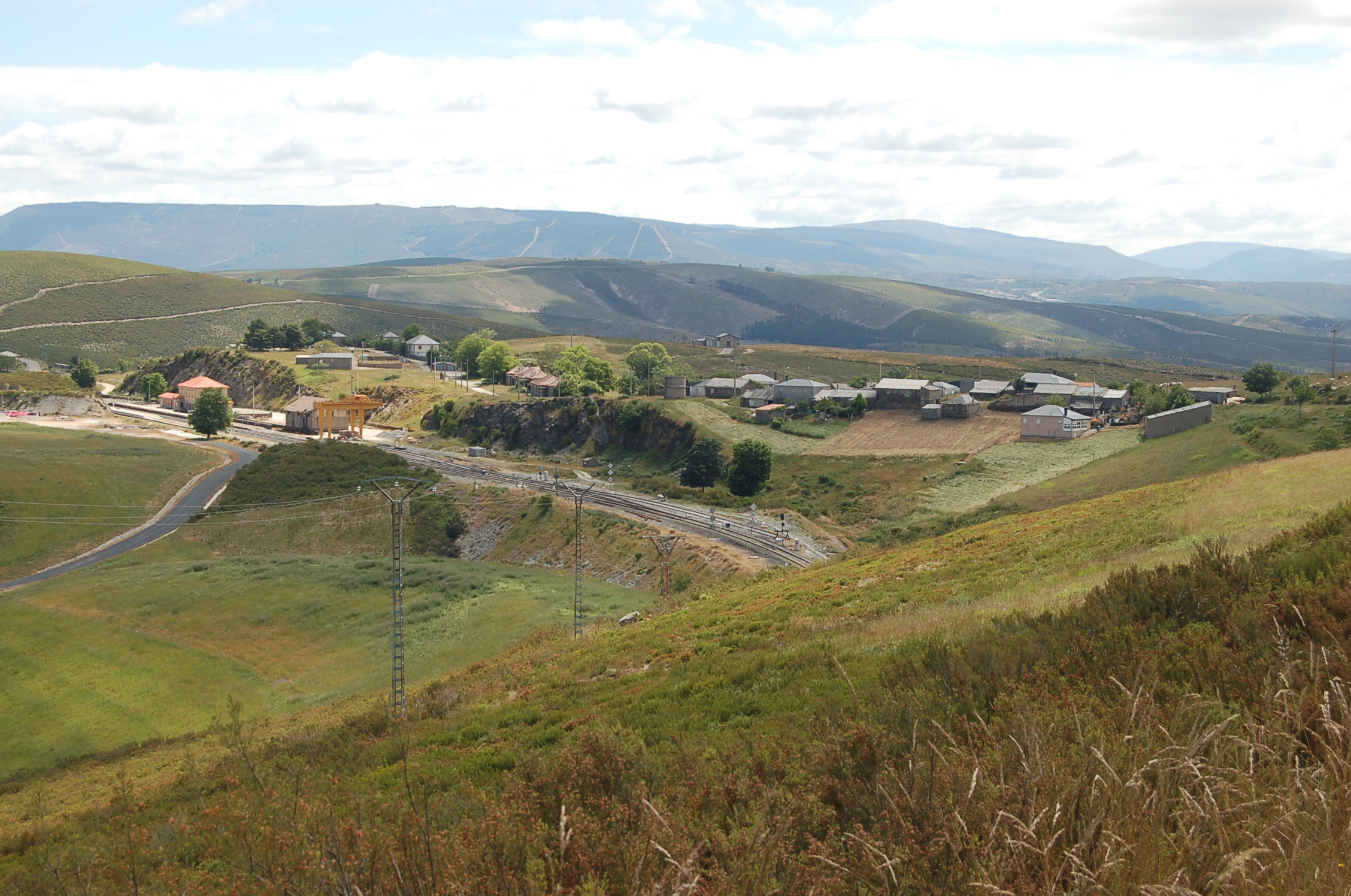 Vista xeral da aldea da Venda da Capela desde o oeste